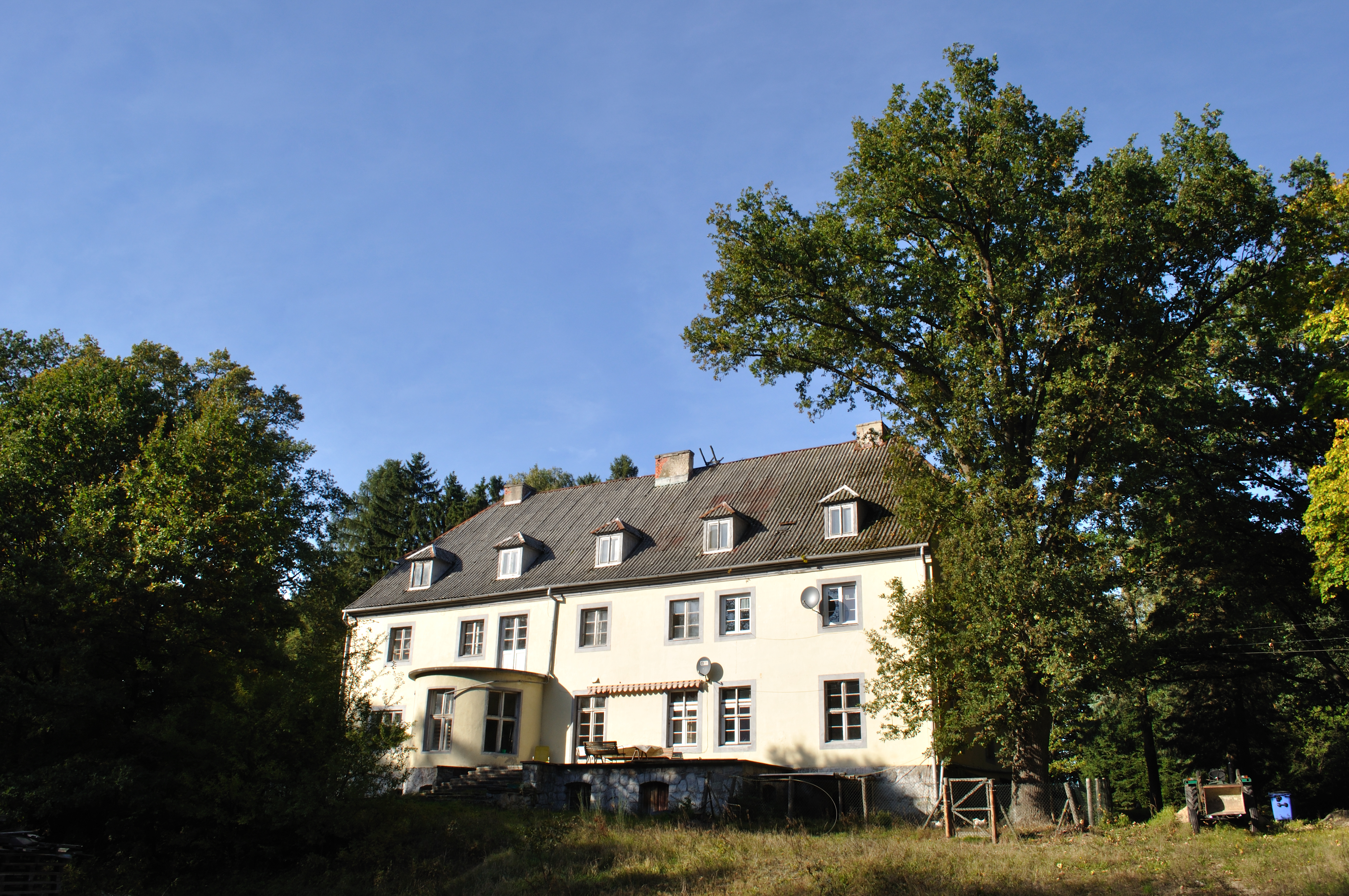 Dobrociechy - park dworski z aleją dojazdową, XIX w.